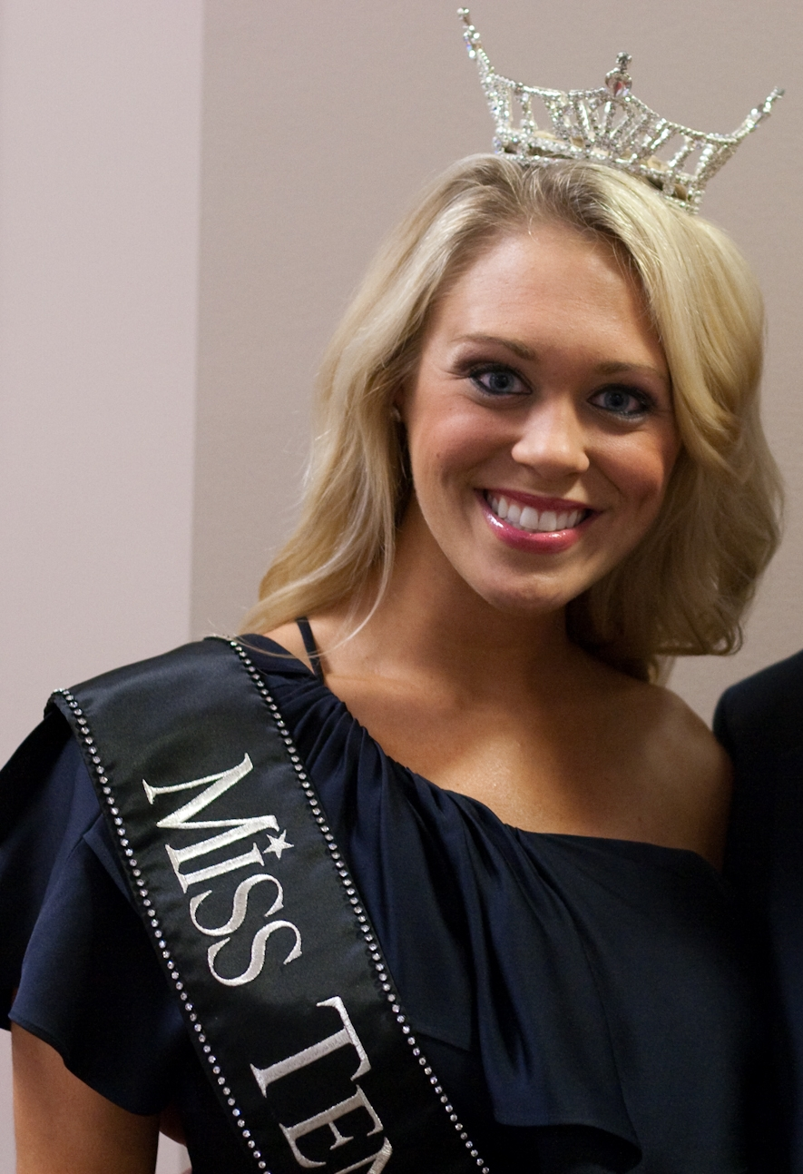 Stephanie Wittler, Miss Tennessee 2009